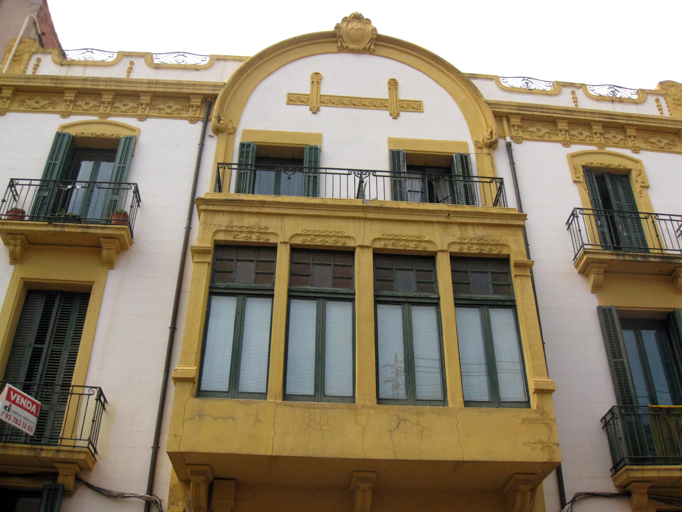 Casa Mercedes Pous Cunill. al carrer de la Creu Gran núm. 39 (Terrassa). Edifici modernista de Josep Masdeu del 1915. Detall de la façana amb la tribuna central.